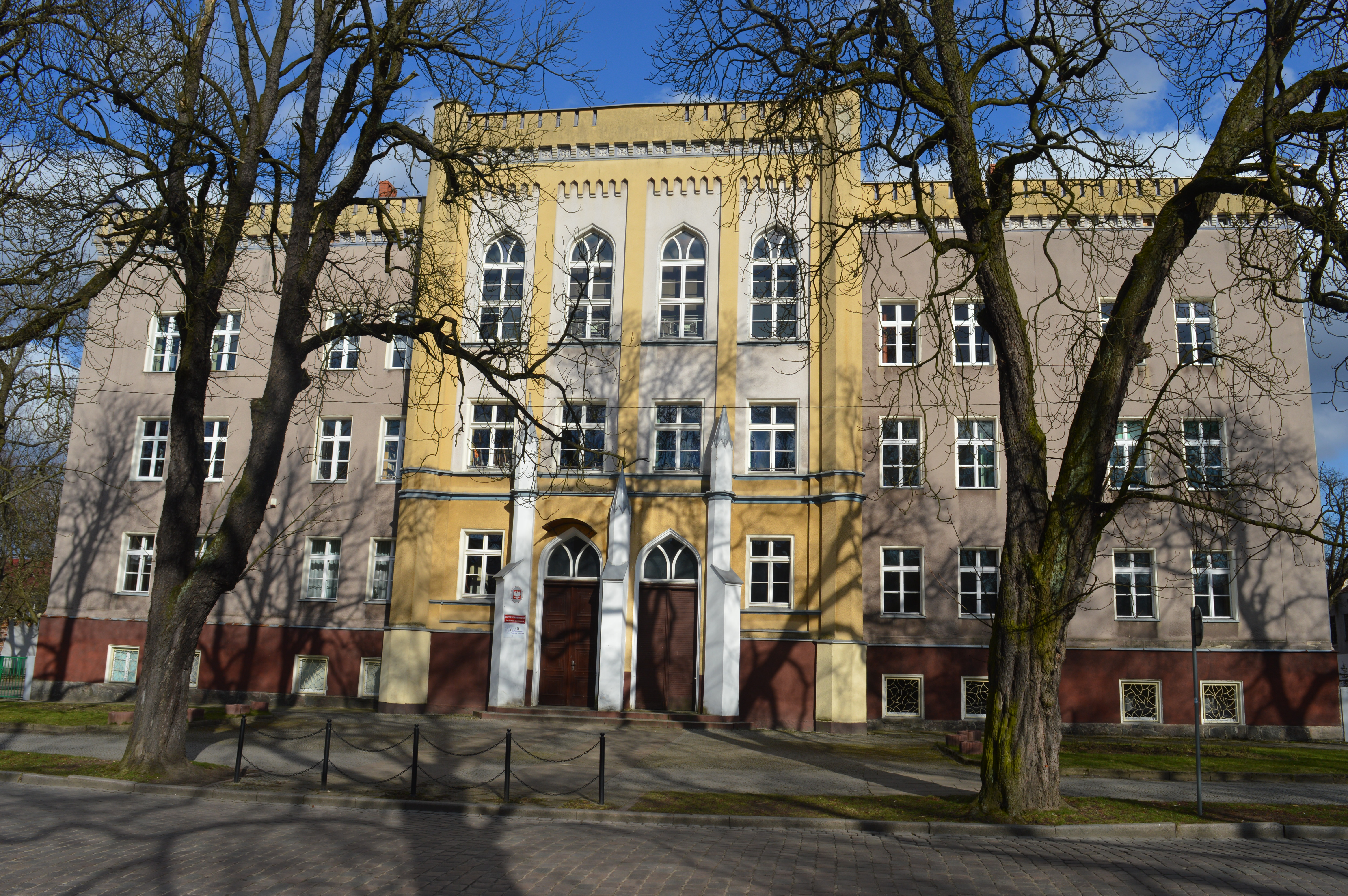 Słupsk, ul. Szarych Szeregów 15 - pierwotnie gimnazjum z 1856, obecnie I Liceum Ogólnokształcące im. Bolesława Krzywoustego